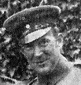 Emil Krupa-Krupinski in den Reihen des Lauenburgischen Jäger-Bataillons Nr.9